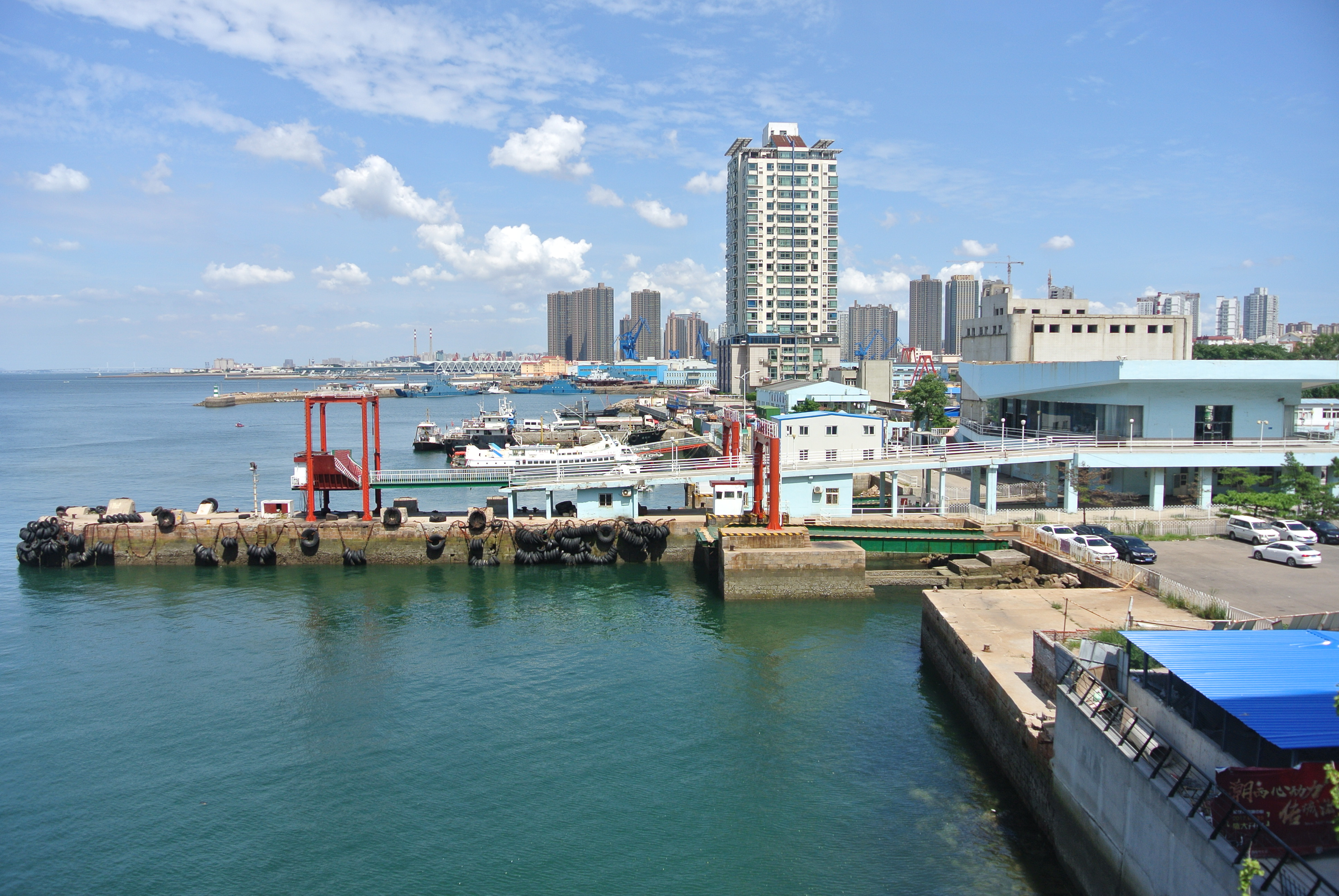 青岛轮渡站码头